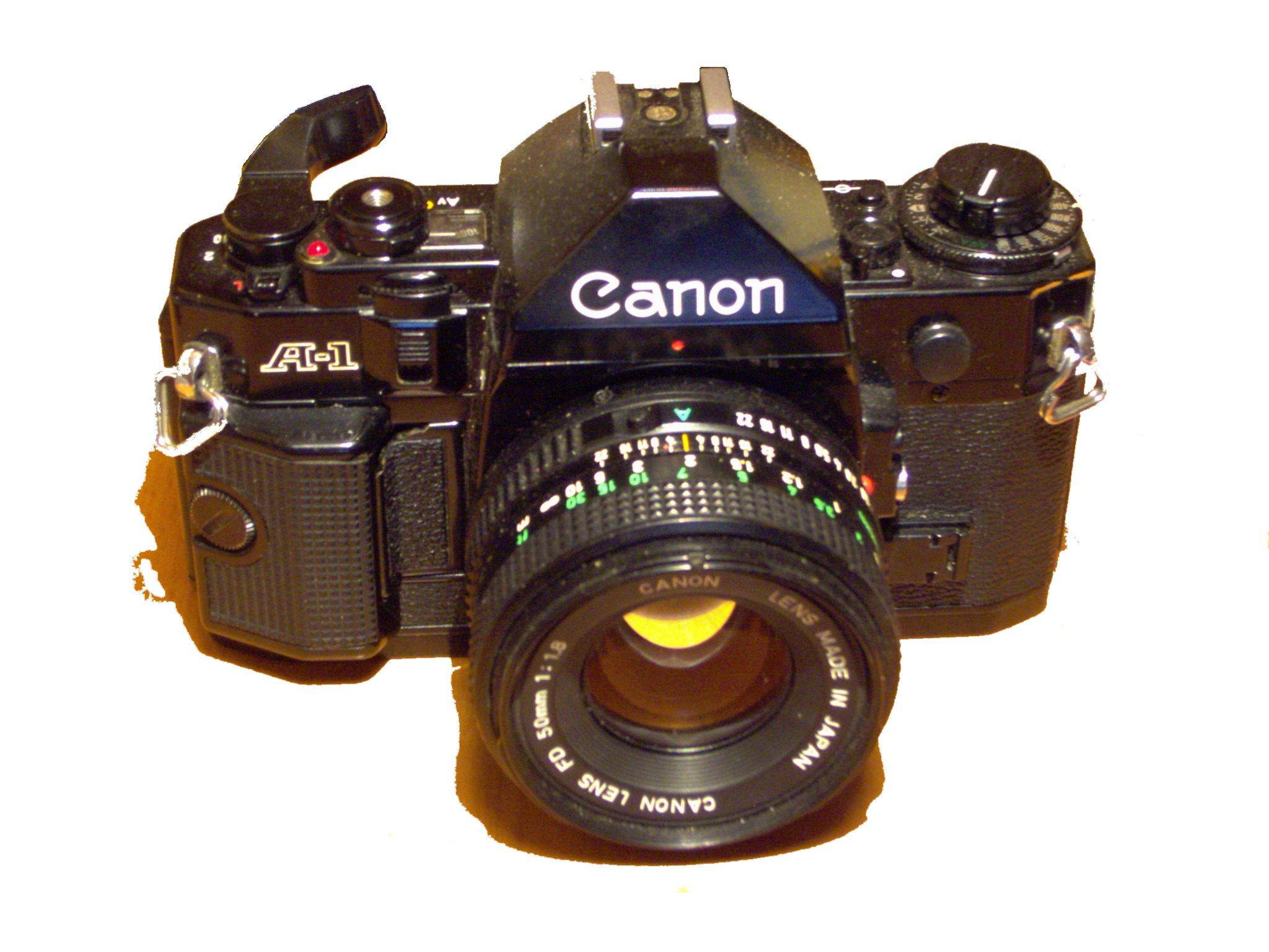 Selbst Aufgenommen, gemeinfrei